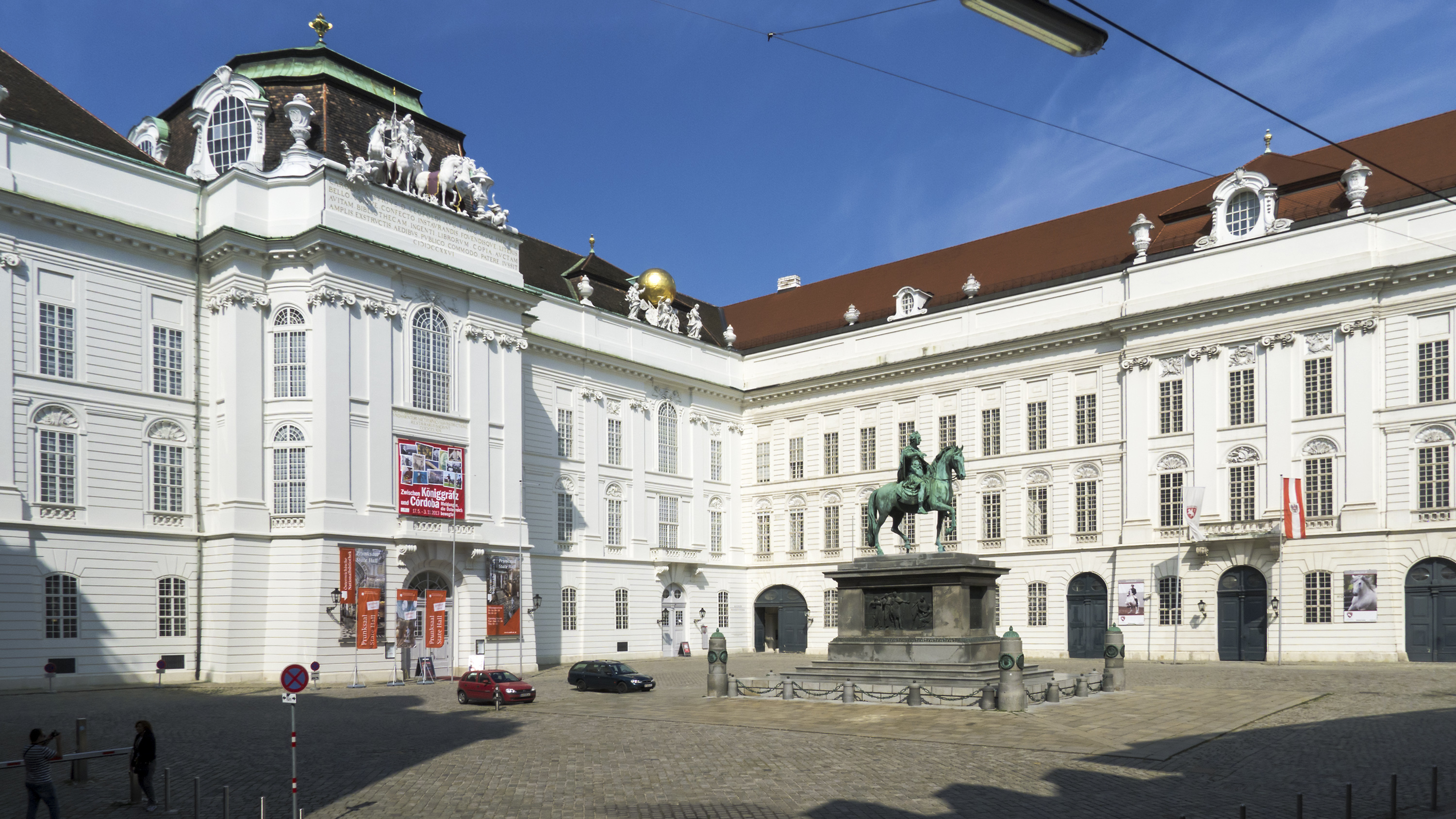 Josefsplatz in Wien 1 bei Nr. 6 Richtung Westen